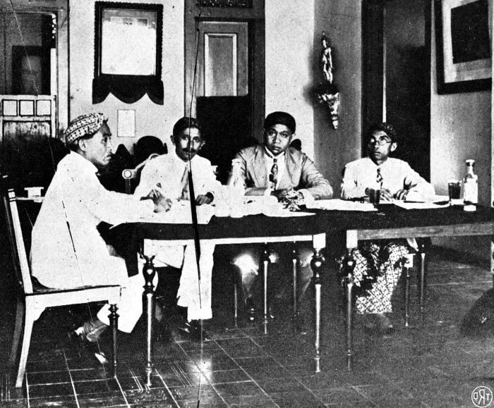 Repronegatief. R.A.A. Wiranatakoesoema, gedelegeerde van de Volksraad en regent van Bandung, in het Comité van Actie van het in 1929 in Surakarta gehouden Congres van Praijaji-Bond